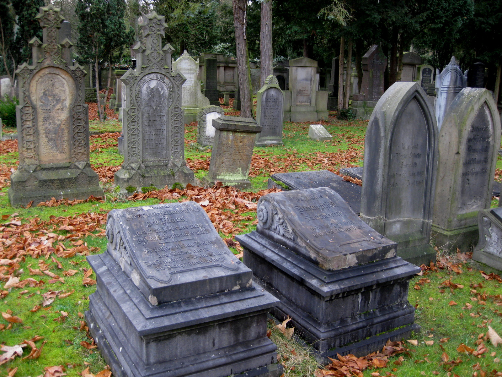 Der Jüdische Friedhof in der Neustadt von Osnabrück